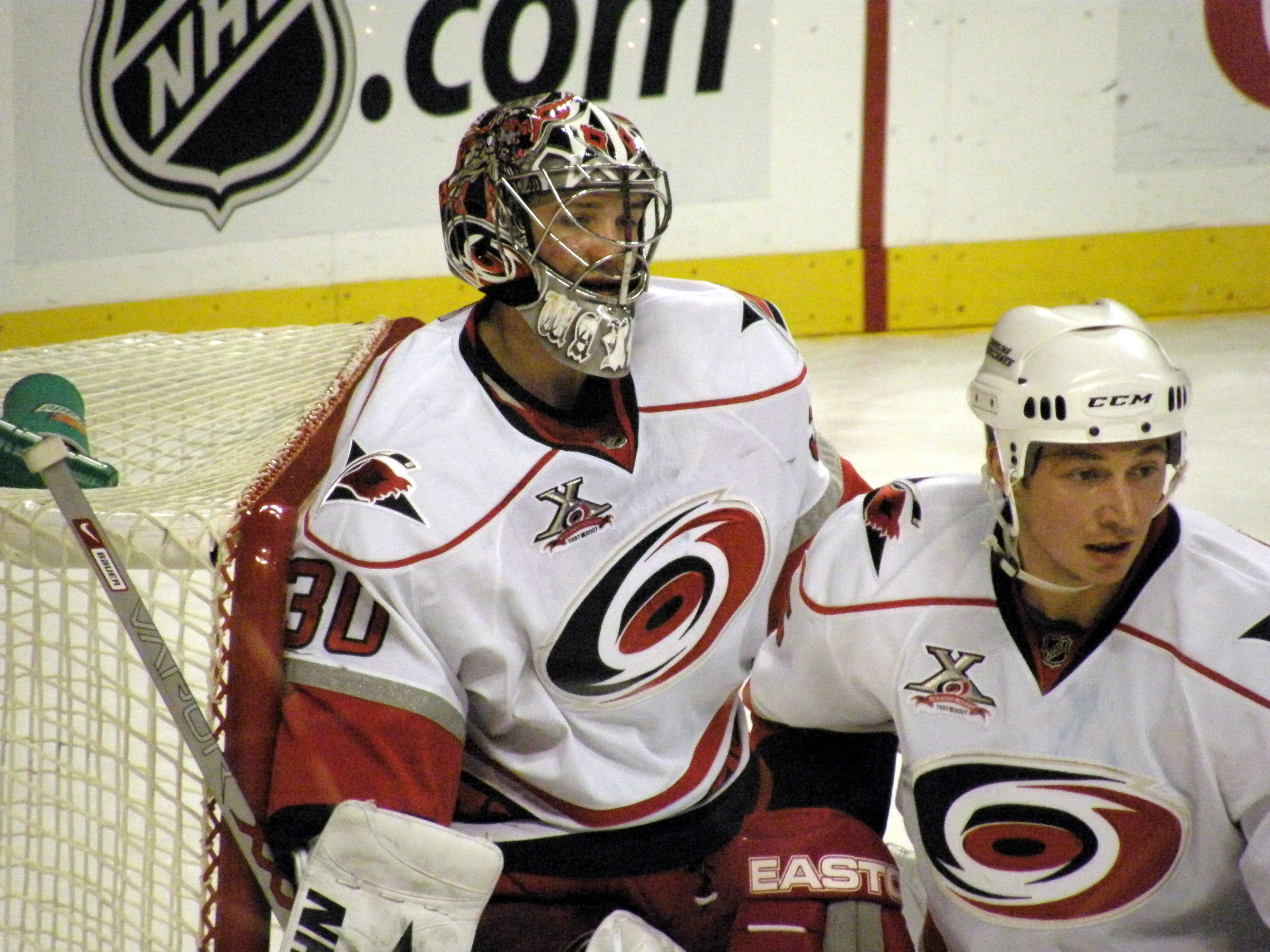 #5 Frantisek Kaberle (D) and #30 Cam Ward (G)